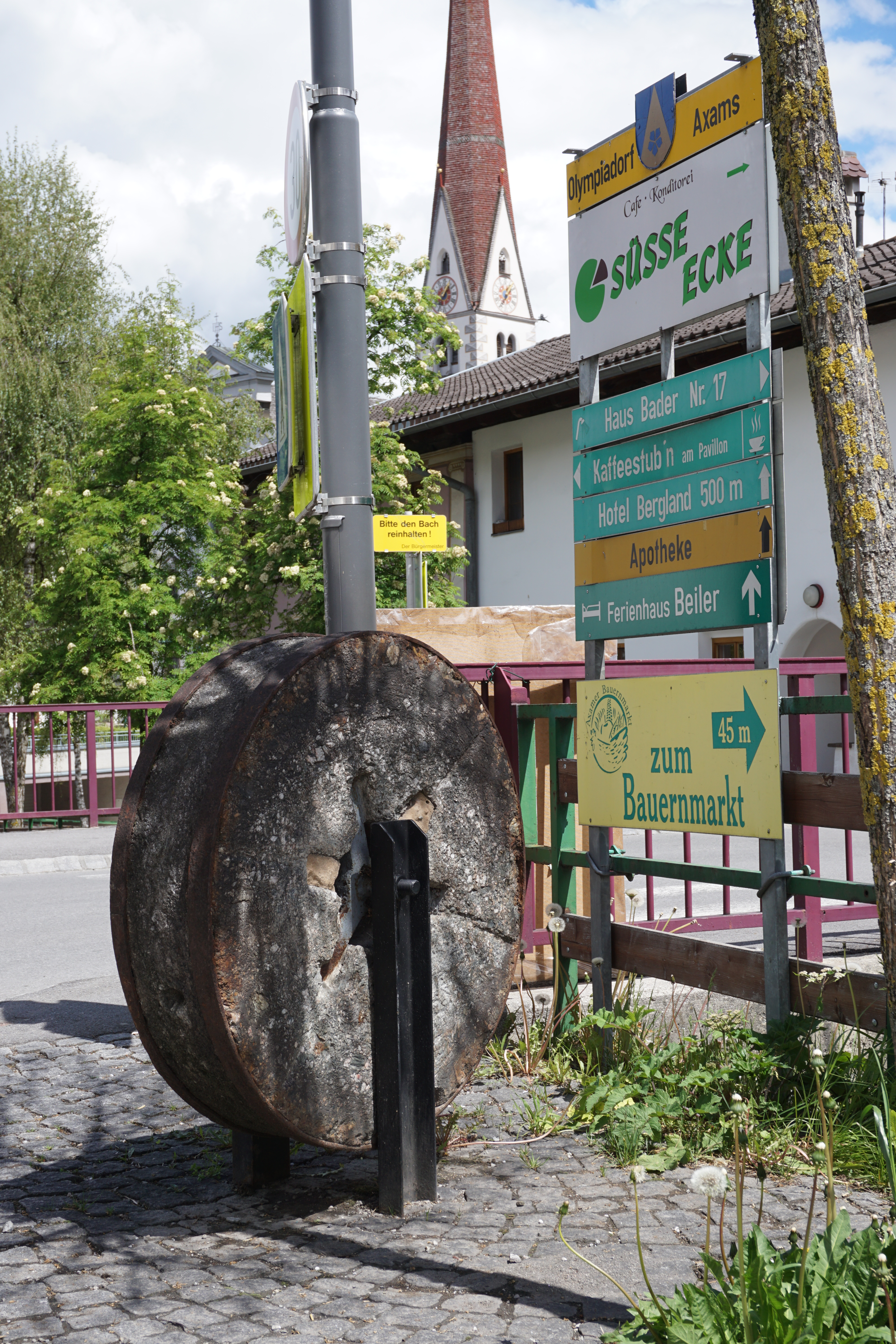 Ein Mühlstein am Axamer Dorfplatz erinnert an die Nutzung der Wasserkraft für Mühlen.